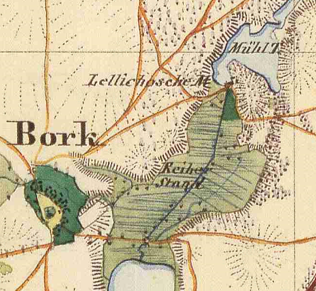 Bork, Ortsteil der Stadt Kyritz, Lkr. Ostprignitz-Ruppin, Brandenburg, Ausschnitt aus dem Urmesstischblatt 2940 Blumenthal von 1841